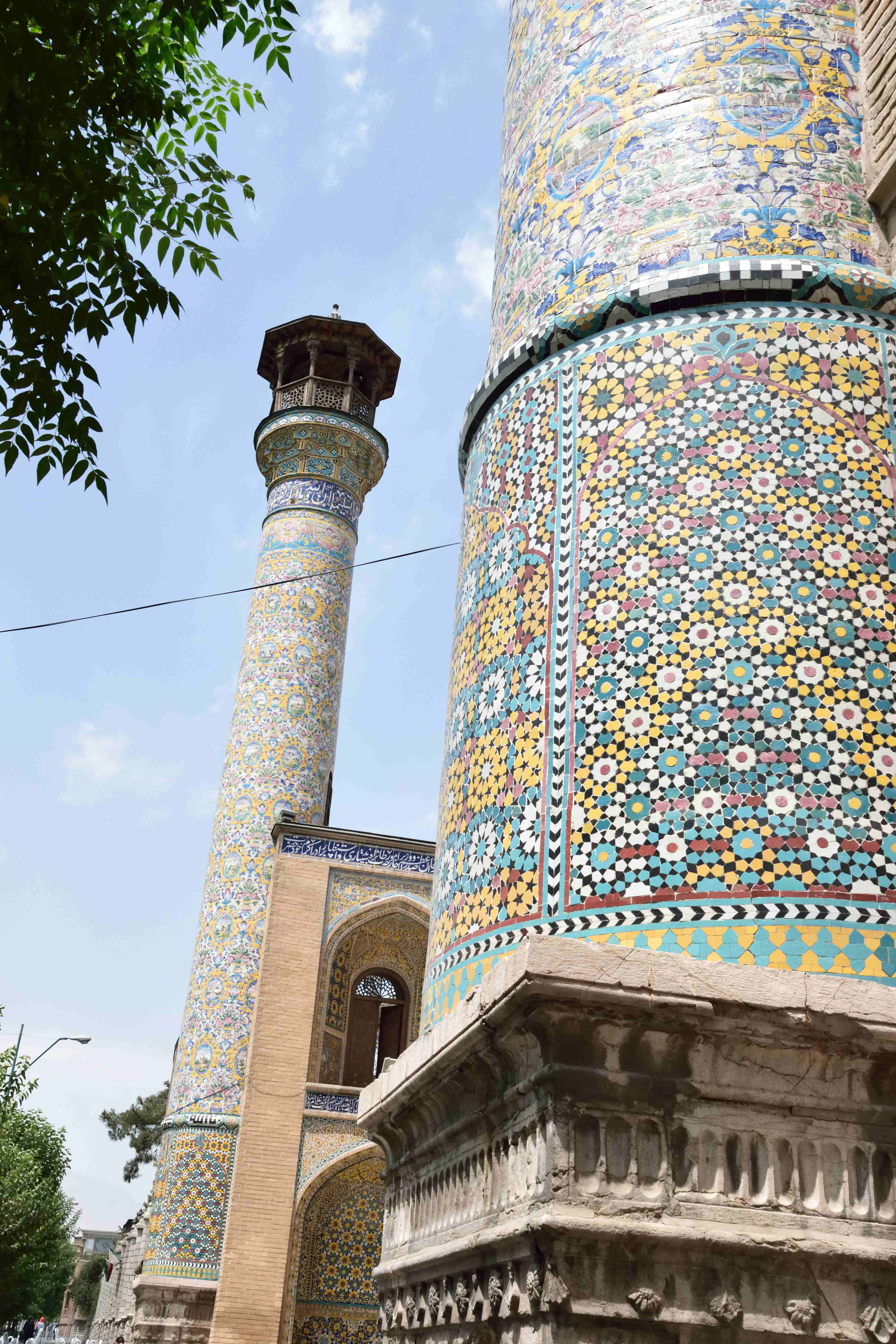 مسجد سپهسالار/ مدرسه عالی شهید مطهری